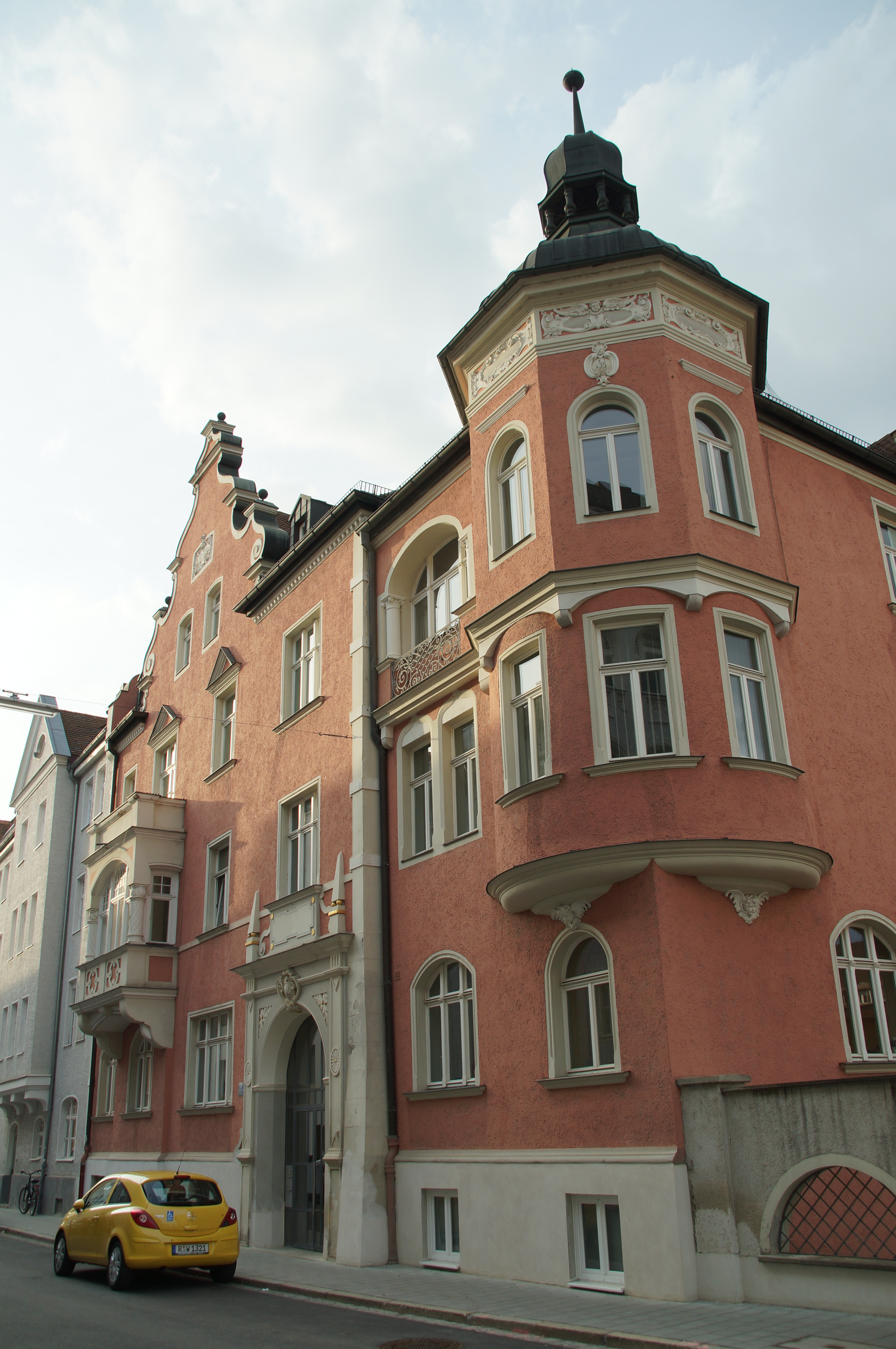 Wohnhaus, dreigeschossiges Walmdachhaus mit Schweifgiebeln, Erker und Eckerkertürmchen mit welscher Haube, Neurenaissance, 1899/1900 von Joseph Koch